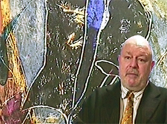 Portrait de Daniel Humair